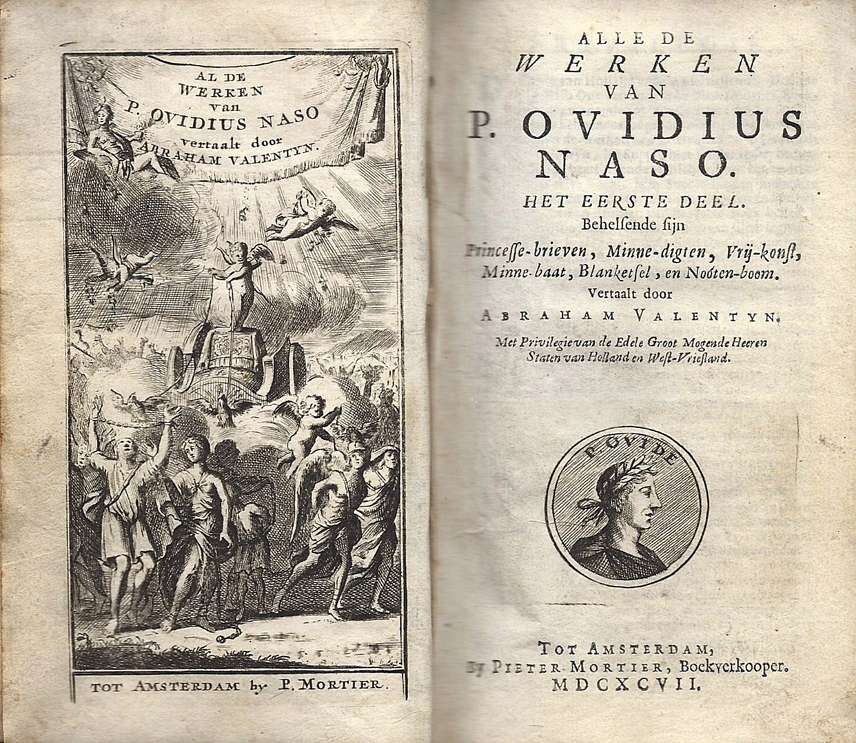 Seite 2 und 3 der Amsterdamer Ausgabe 1697 von OvidsWerken, gescannt